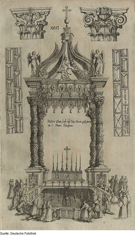 Original image description from the Deutsche Fotothek Architektur & Geometrie & Altar & Säule & Kapitell & MauerwerkPlate XXVI from Abraham Leuthner’s 1677 architecture treatise Grundtliche Darstellung, Der Fünff Seüllen wie solche von dem Weitberühmbten Vitruvio Scamozzio und andern Vornehmben Baumeistren Zuesamben getragen und in gewiße Außtheillung verfasset worden ….